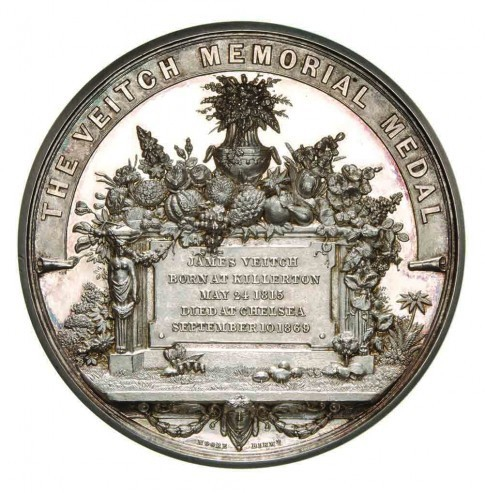 Veitch Memorial Medal des Veitch Memorial Trust (1870), später vergeben durch die Royal Horticultural Society (RHS)